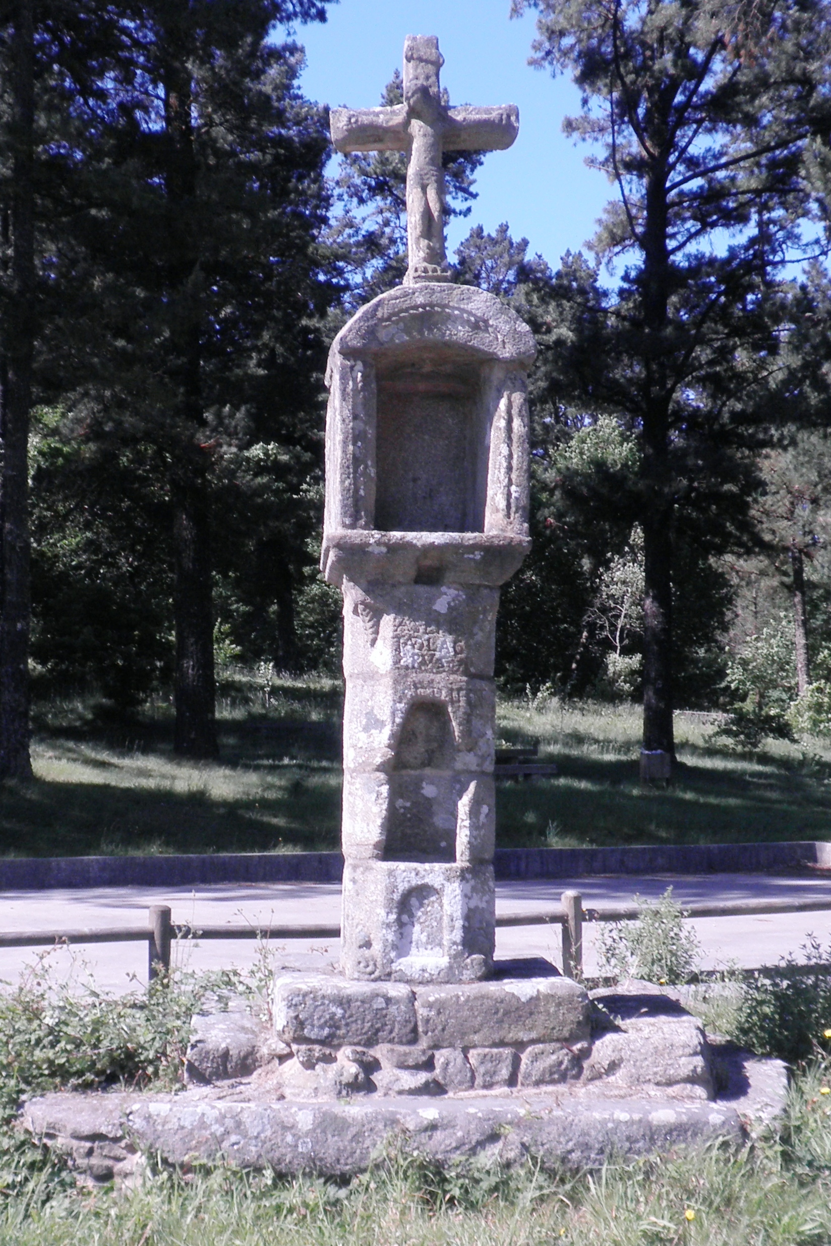 Cruza de Avelán